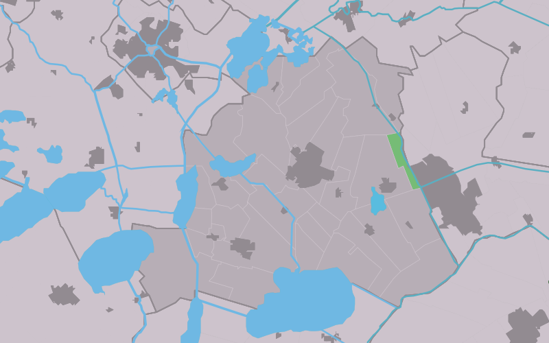 Kaartsje fan himrik fan Nijehaske